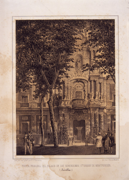 Estampa. Puerta Principal del Palacio de los Sres. Duques de Montpensier.